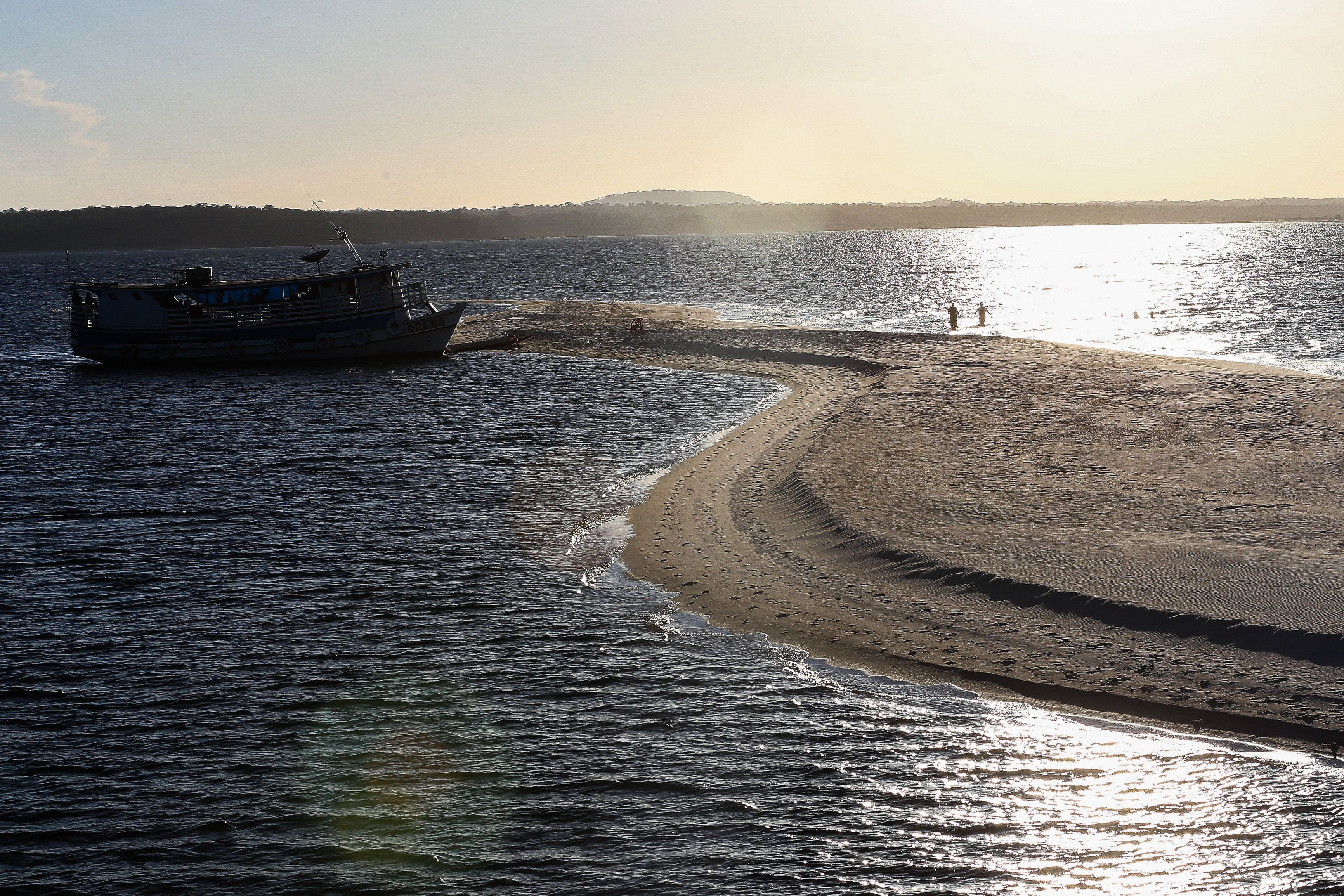 Santarém (PA) - Ponta Grande no Rio Arapiuns no trajeto da Comunidade de Mentai para Anã (José Cruz /Agência Brasil)